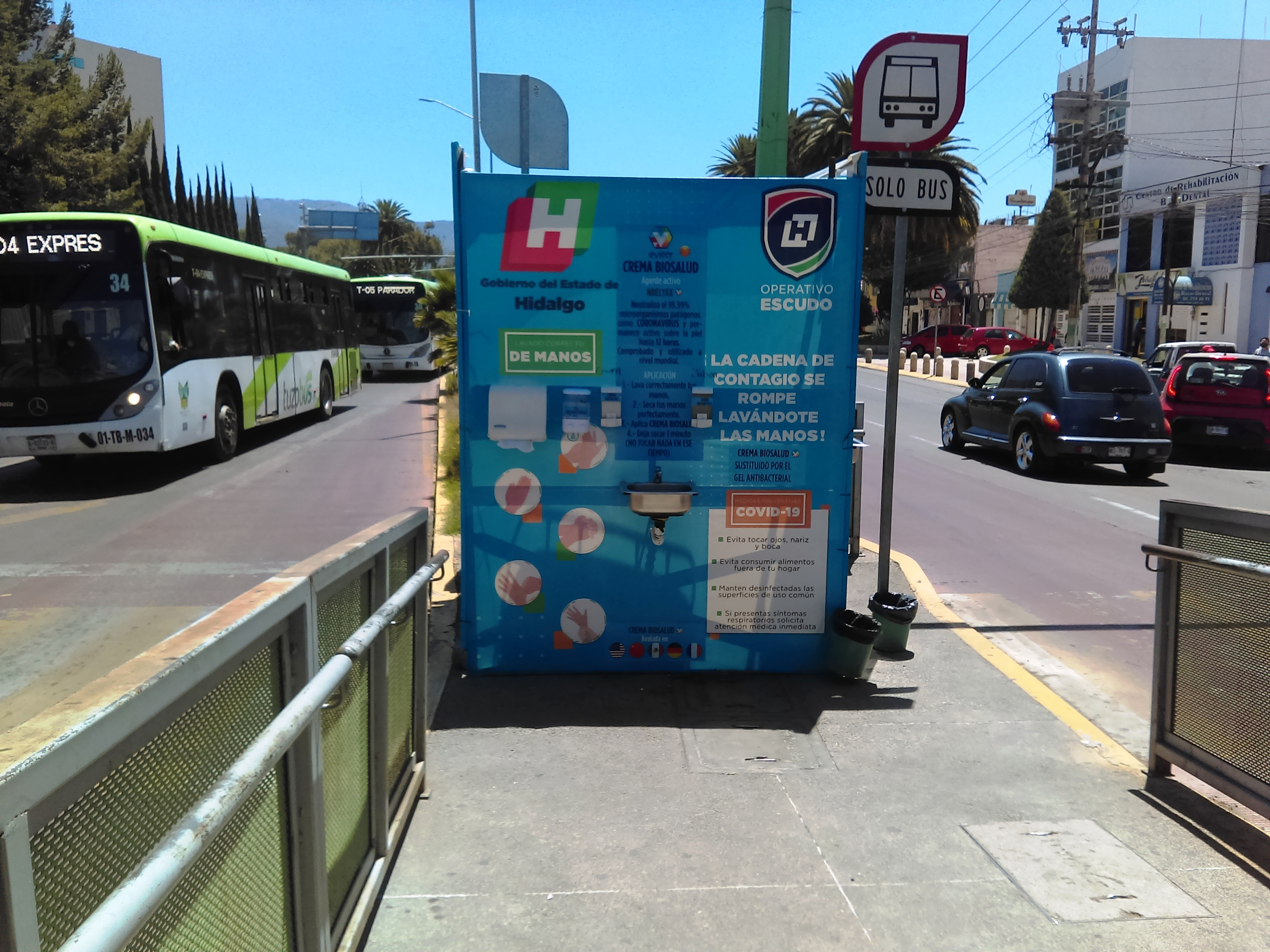 Lavamanos comunitario instalado en Pachuca, Hidalgo.